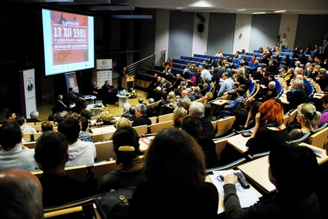 Konferencja 13 XII 1981 W OCZACH POLAKÓW I FRANCUZÓW Warszawa, Uniwersytet Warszawski, 14 grudnia 2011 n/z: Marcel Grignard,Bernard Guetta, Adam Michnik, Konstanty Gebert. photo: Monika Lisiewicz